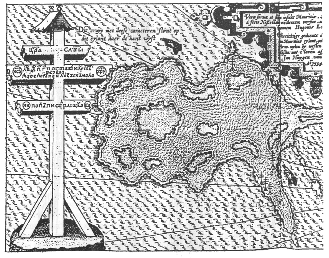 Крест на острове Матвеев. Рисунок из книги Яна Гюйгена ван Линсхотена (изд. 1611) из раздела, посвящённого участию в первой экспедиции В. Баренца (1594).